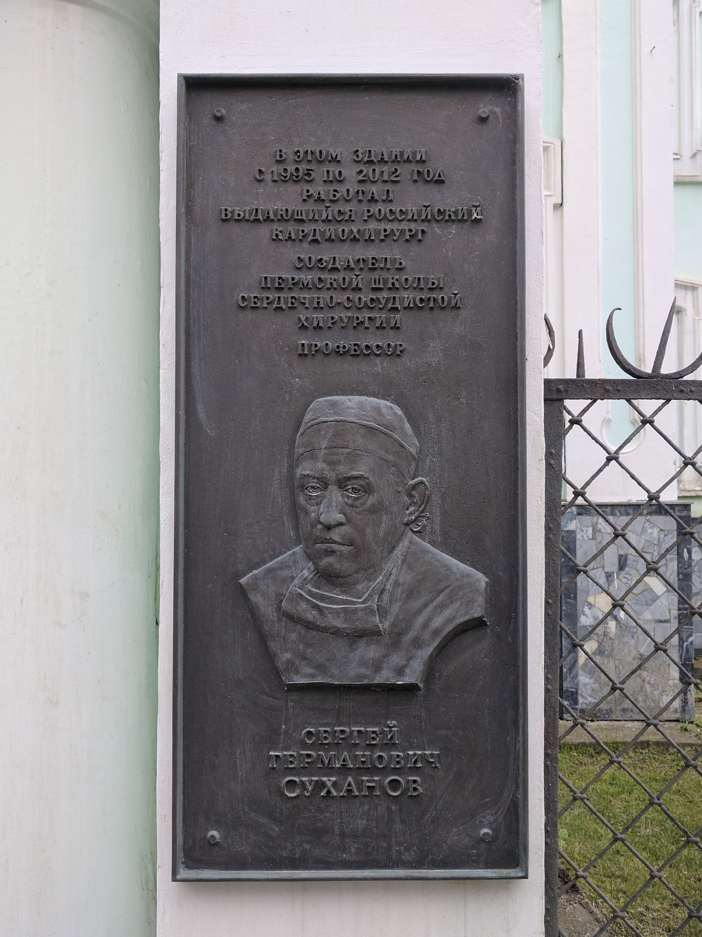 Хирургическое отделение в Перми. Табличка "В этом здании с 1995 по 2012 год работал выдающийся российский кардиохирург, создатель пермской школы сердечно-сосудистой хирургии, профессор Сергей Германович Суханов"